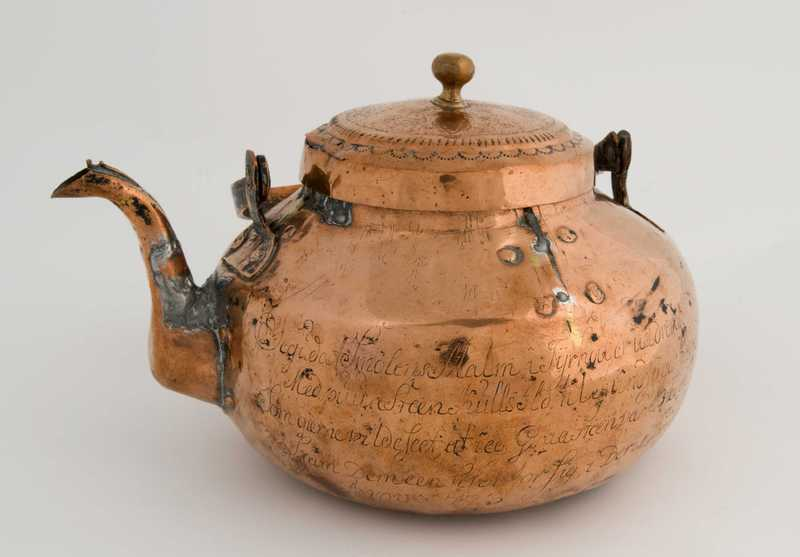 Kaffekjele, Norsk Folkemuseum, NF.1910-0376, datert 1723. Innskrift: Jeg udaf Smølens Malm i Fyrhone er uddreven ... Anno 1723. Produksjonssted: Møre og Romsdal, Smøla